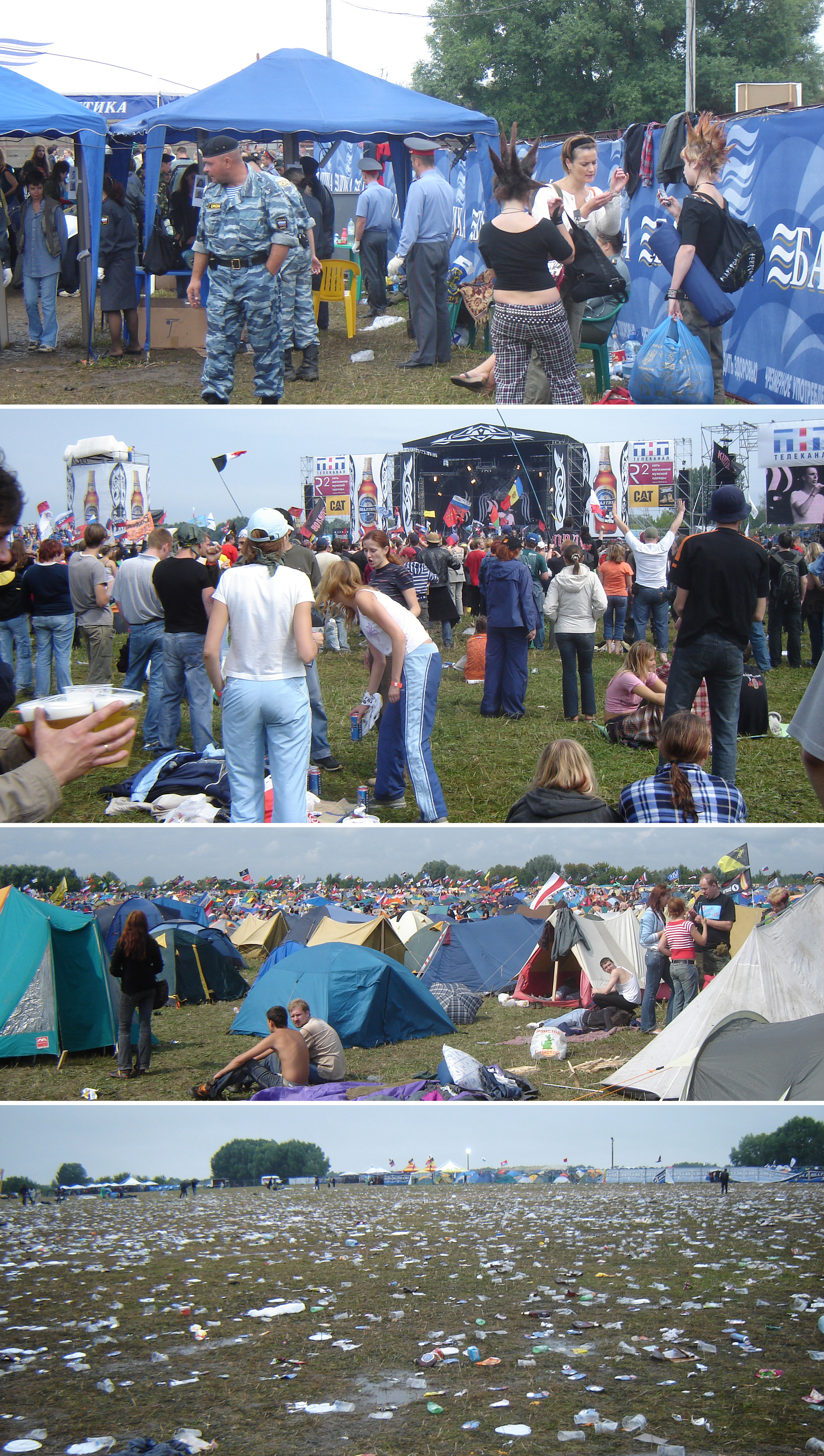 Рок-фестиваль «Нашествие». 2006 г., Рязань, озеро Ореховое. Автор фото и коллажа: Андрей Миронов